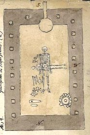 Klopfleisch skizzierte hier die Ansicht der Totenhütte. Die Anordnung der Beigaben ist gut zu erkennen. In der Skizze sind 2 vollständige Skelette kreuzförmig übereinandergelegt zu erkennen. Das war nicht die Fundsituation, da von dem alten Mann das Skelett nur teilweise, von dem Kind, wenn es denn eines gab, nur 2 Knochen gefunden wurden. Die Skizze ist also eine Rekonstruktion des Ausgräbers, der sie so gezeichnet hatte, wie es seiner Meinung nach ausgesehen habe.